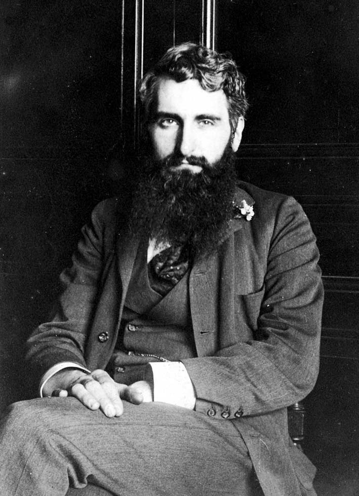 Portrait de Paul Mezzara